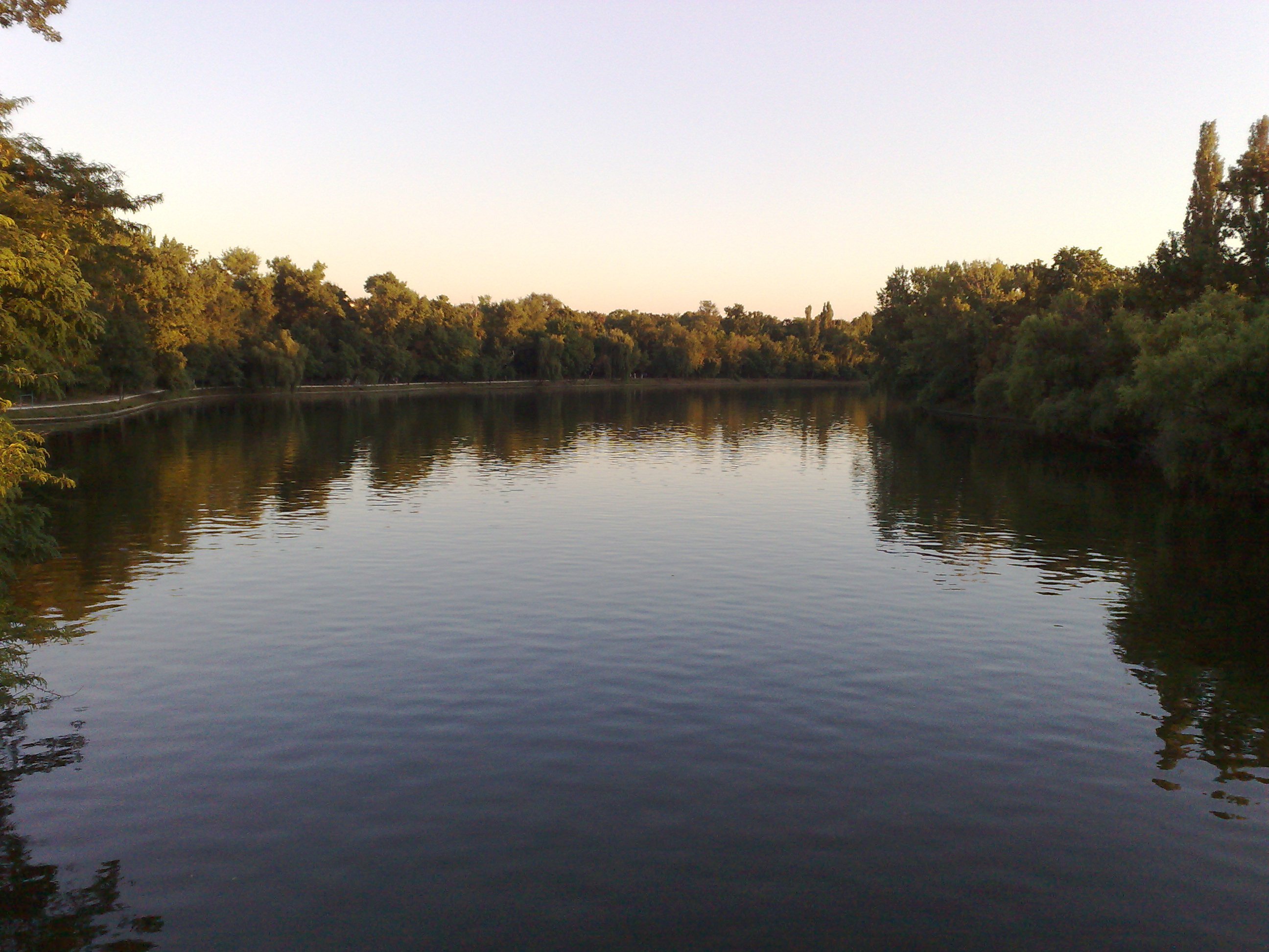 Lacul Herastrau vazut de pe podul de cale ferata